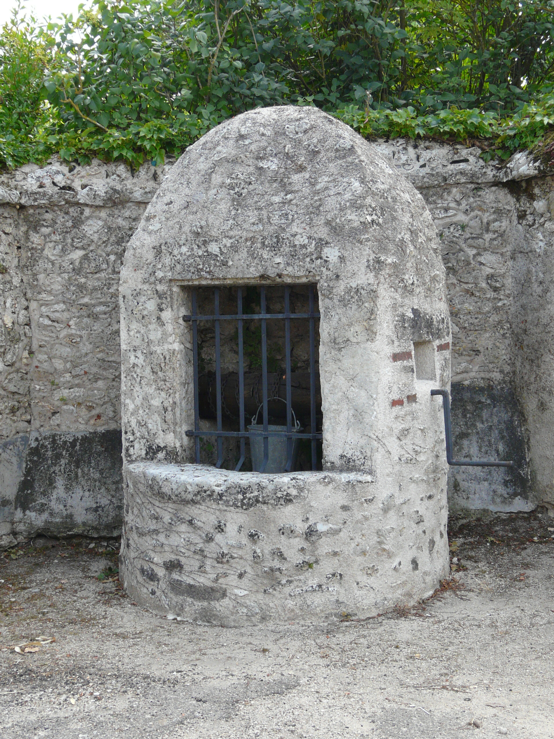 puit typique à Saint Gervais la forêt